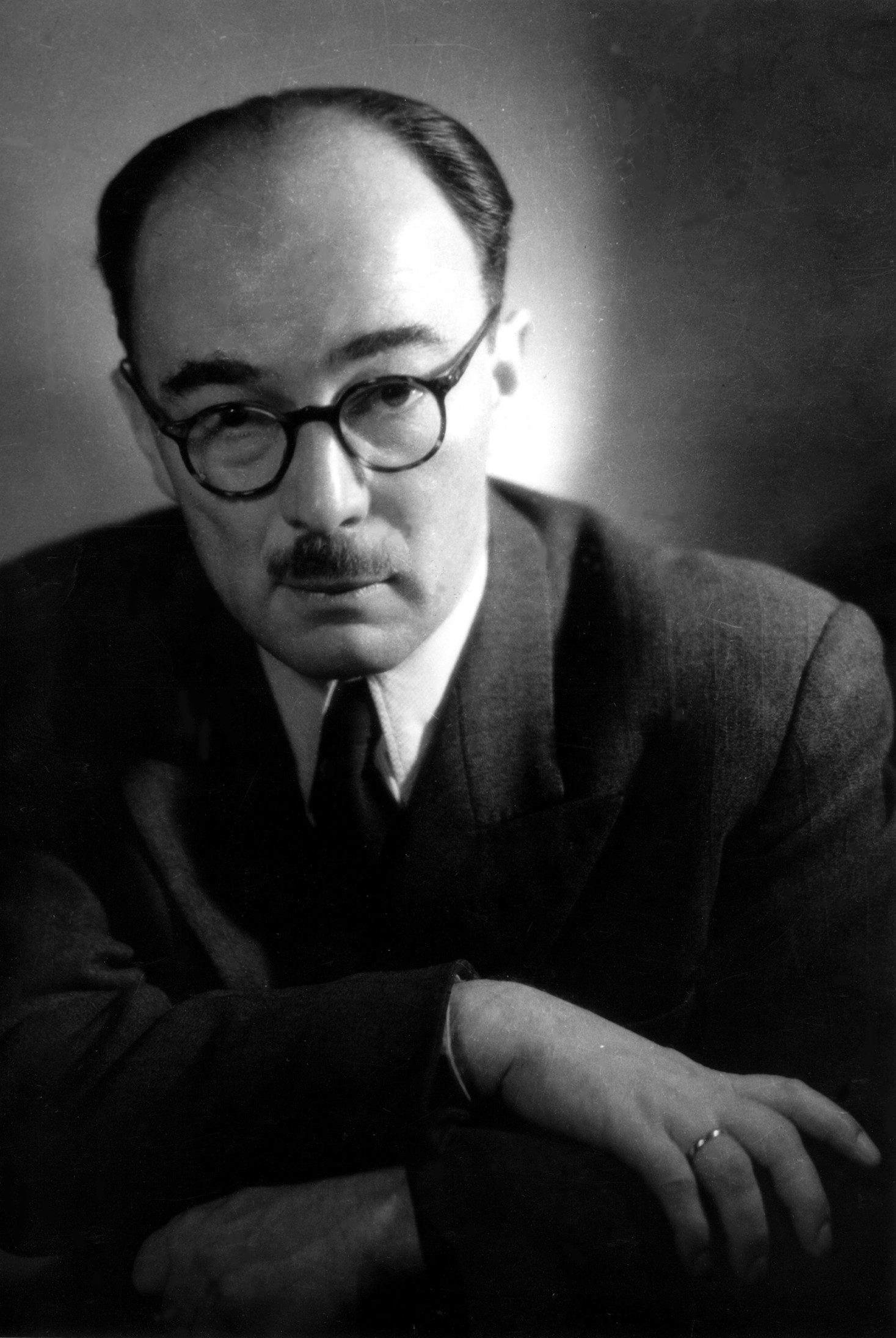 Портретна снимка на Павел Яшеница.